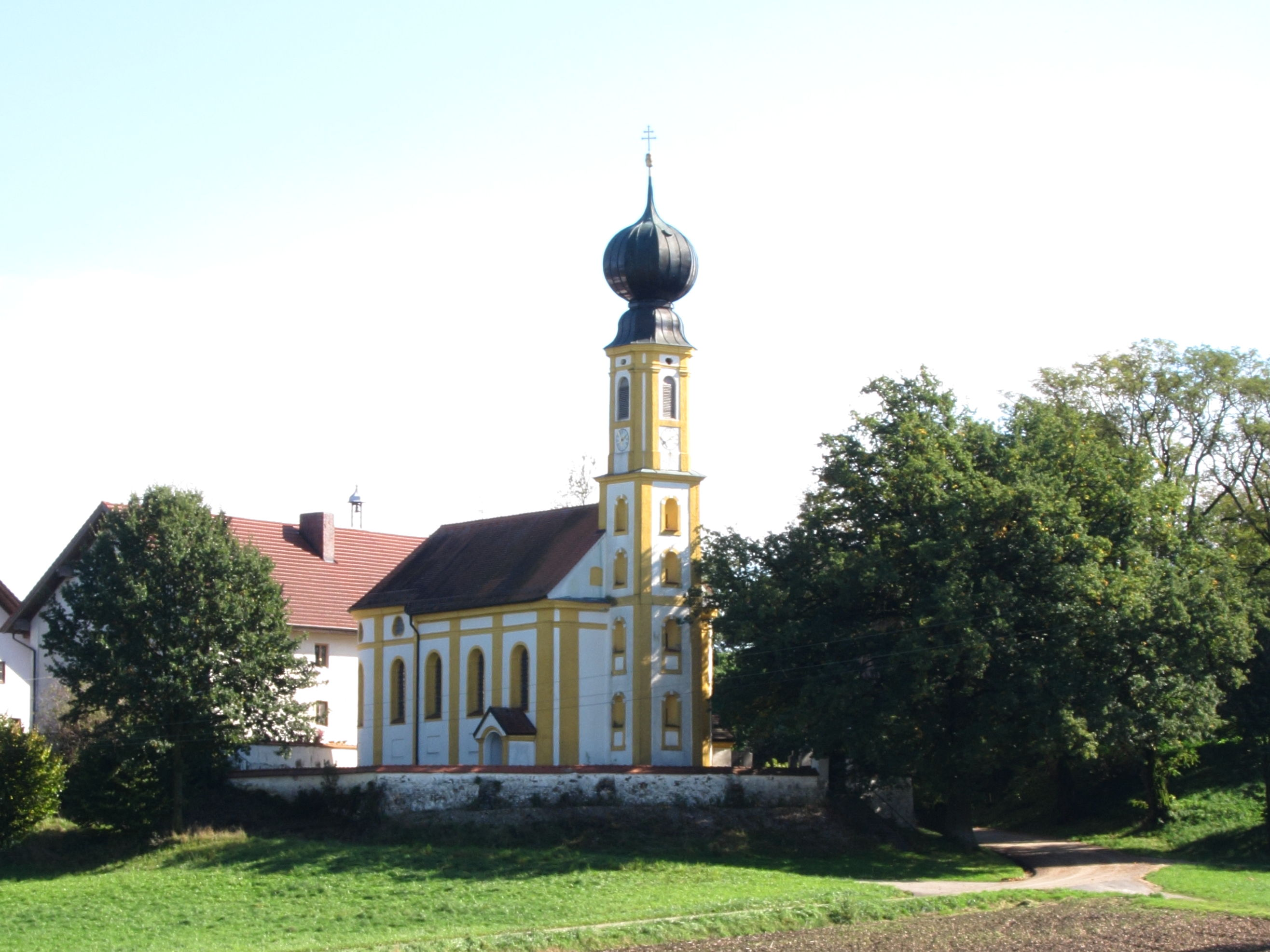 Oppolding; kath. Filialkirche St. Johannes d.T., Saalbau mit Zwiebelturm, in barockem Stil von Johann Baptist Lethner errichtet, 1764; mit Ausstattung.